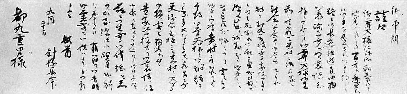 針塚長太郎絶筆 都丸茂重の弔詞（都丸茂男宛）